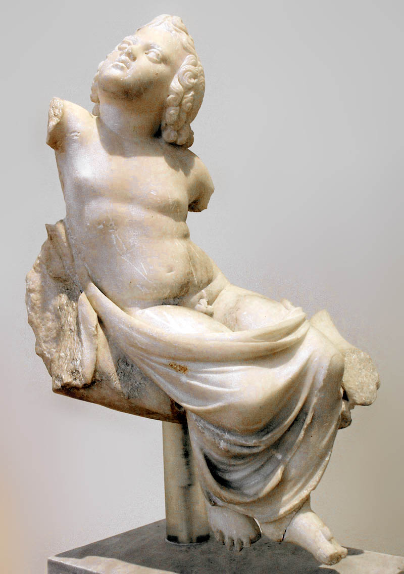 Statue de Ploutos trouvée dans le port du Pirée. Ploutos représenté comme un enfant est assis sur l'avant-bras d'une figure adulte. Dans la main de la figure est préservée la pointe d'une cornucopia. La statuette appartenait à un groupe d'Eirene et de l'enfant Ploutos. Copie faite au Ier s. p. C. d'un original de bronze par Kephisodotos érigé sur l'Agora vers 374-370 a. C.